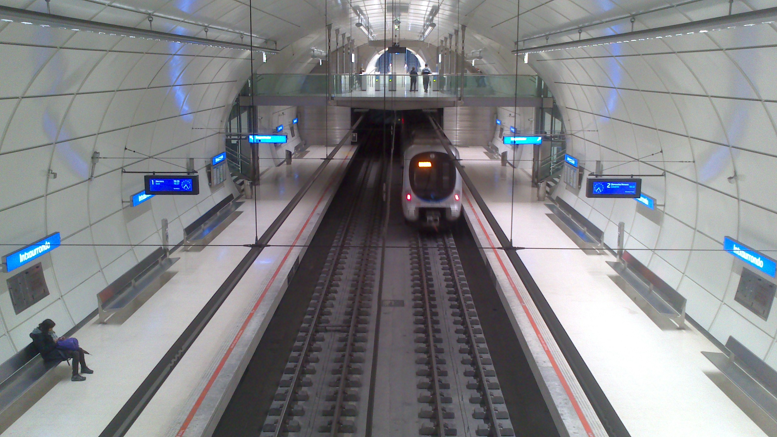 Tren saliendo hacia Amara